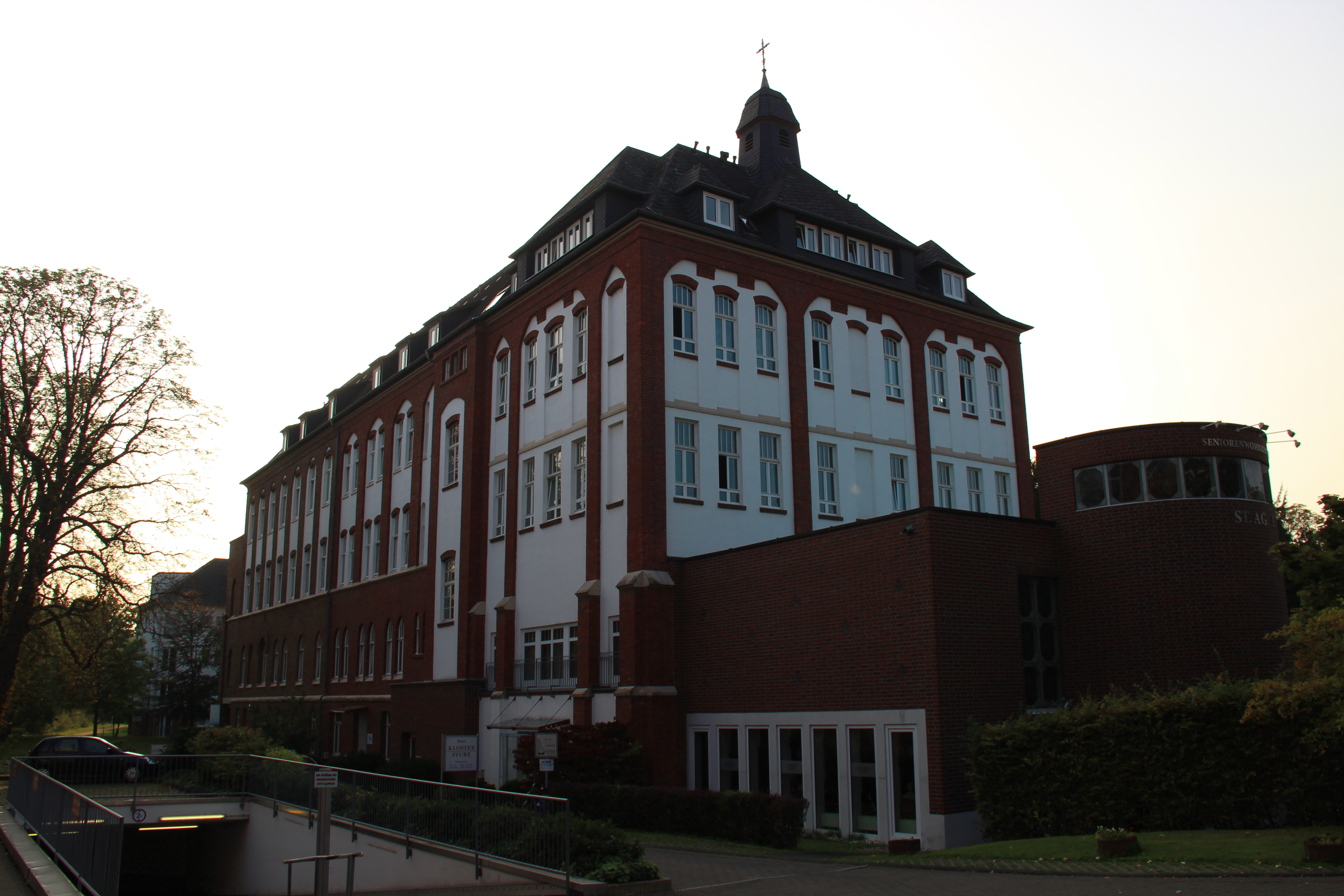 Ehemaliges Sankt-Agnes-Stift, Graurheindorfer Straße 151/151a, Bonn-Castell